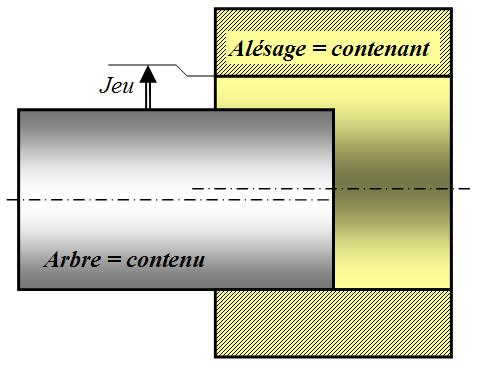 schéma personnel.